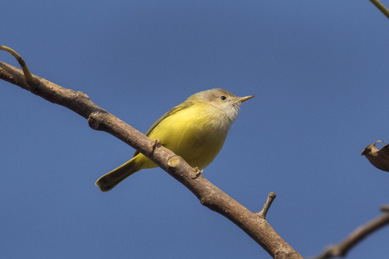 Senegal Erememola - Gambia 17_CD5A1455